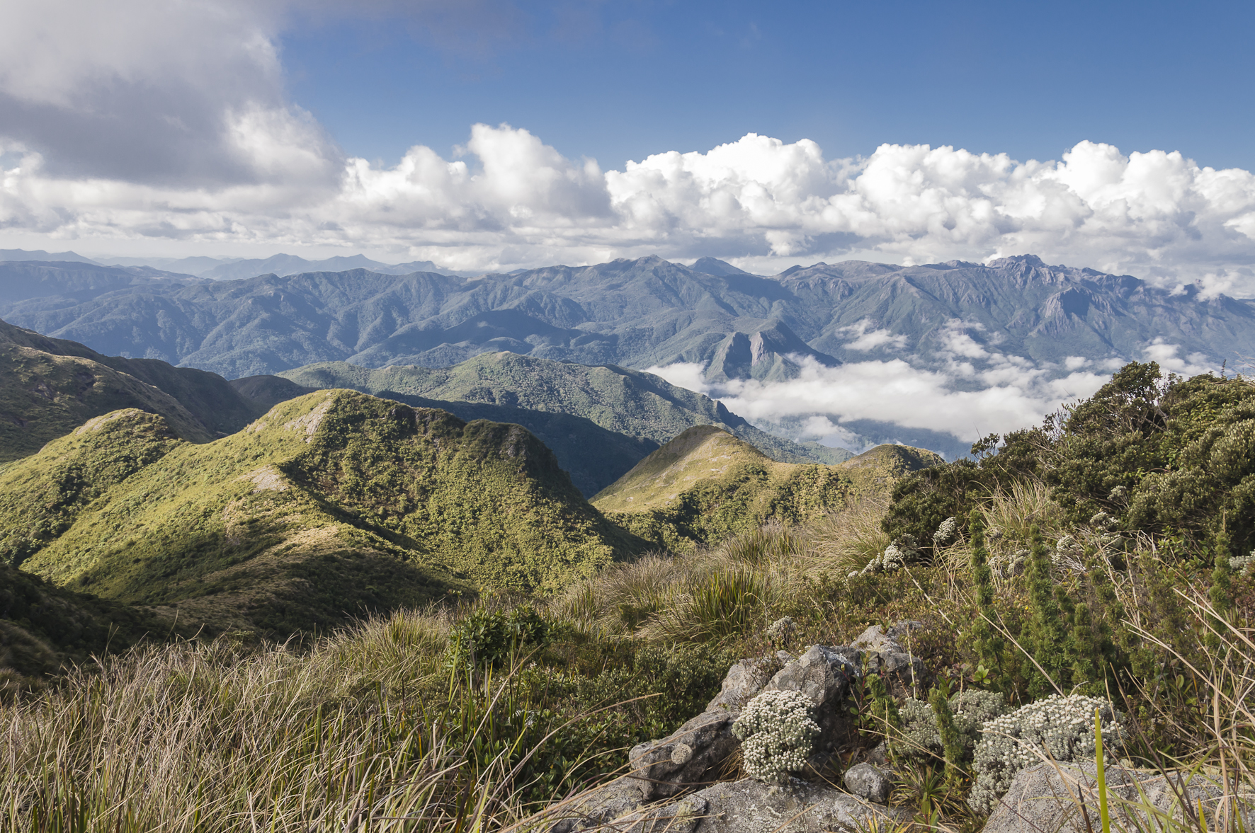 Um dos inúmeros cenários da bela Serra da Mantiqueira